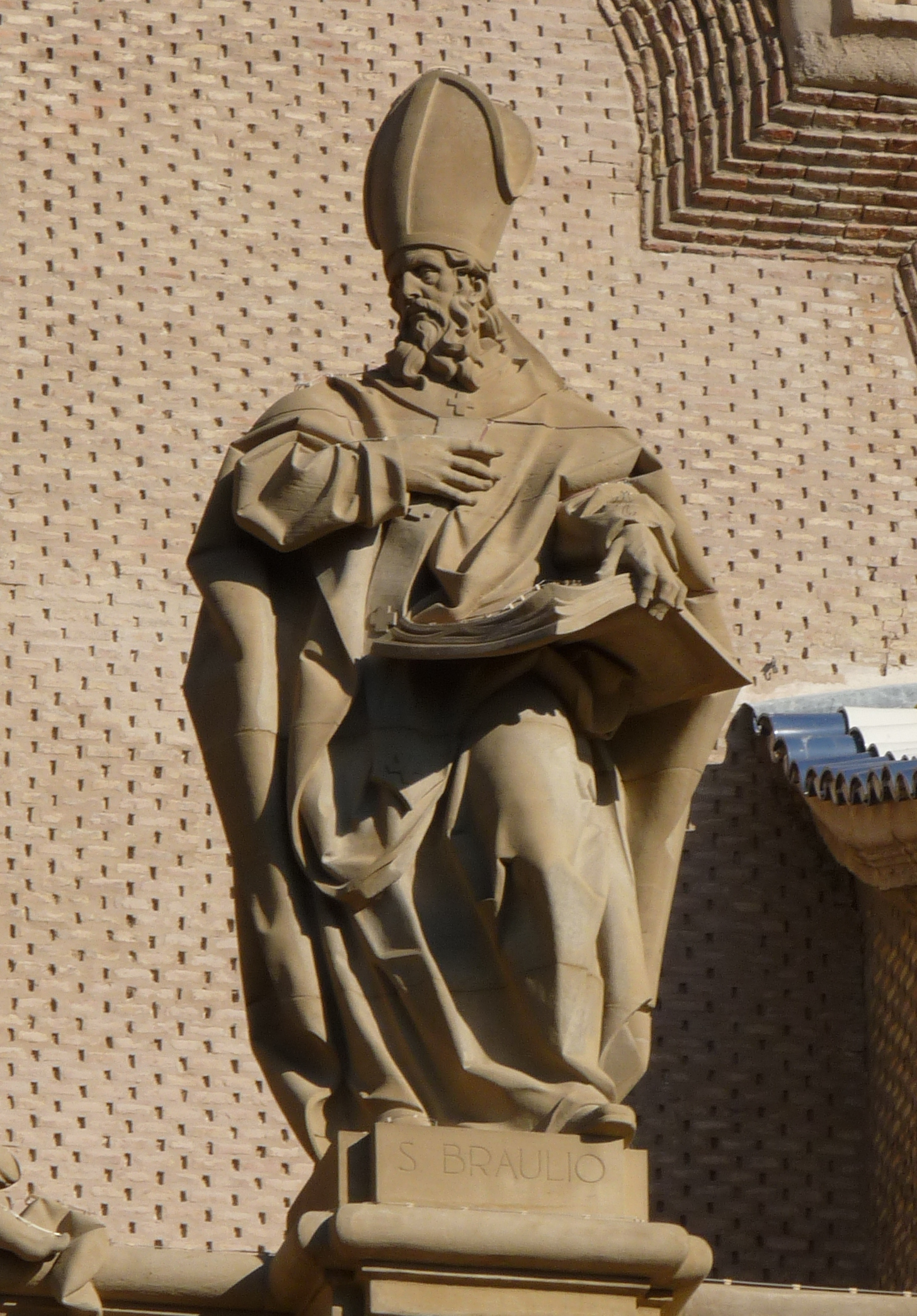 Zaragoza - El Pilar - Fachada - San Braulio